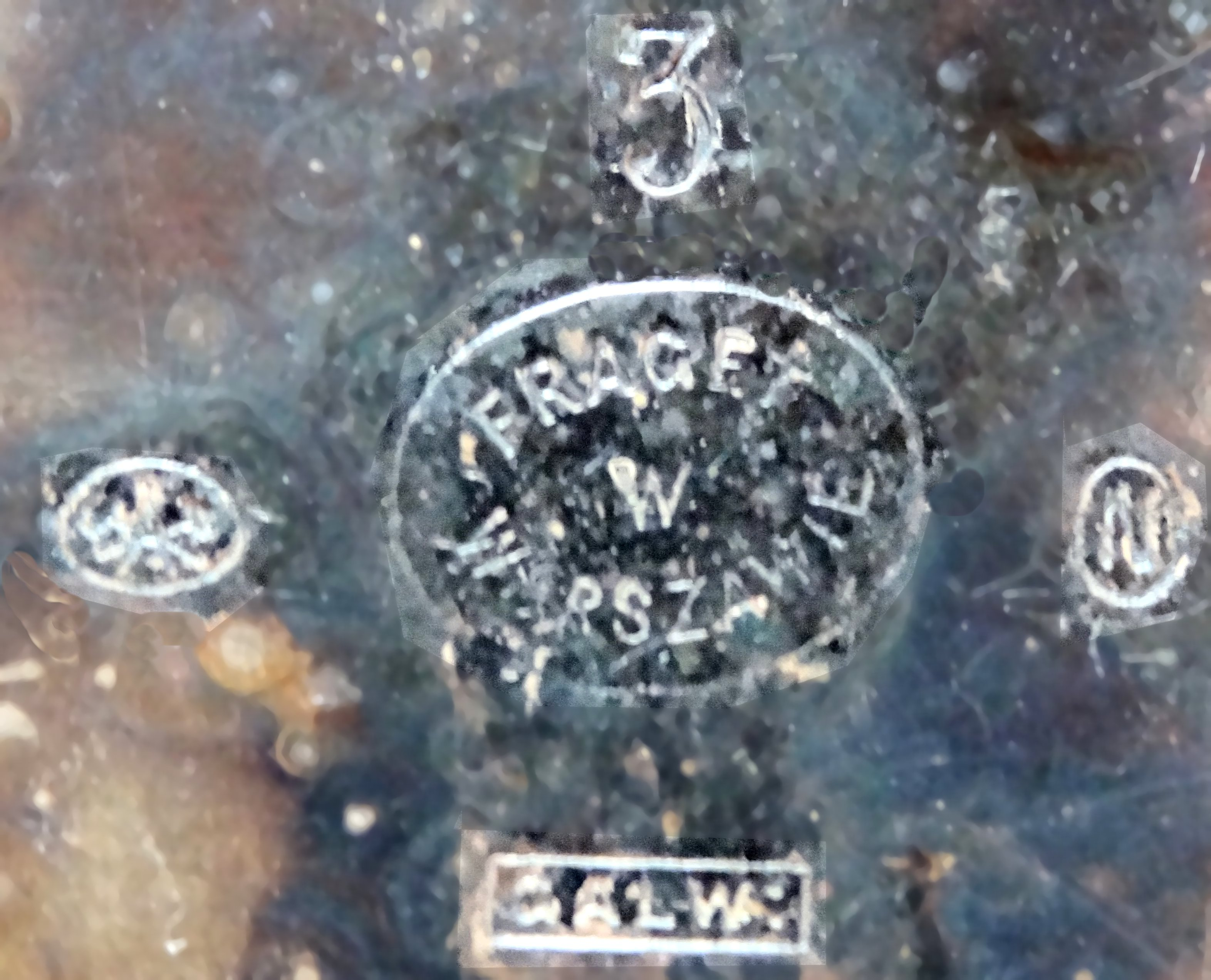 Spód cukiernicy szkatułkowej z oznaczeniami firmy Fraget w Warszawie